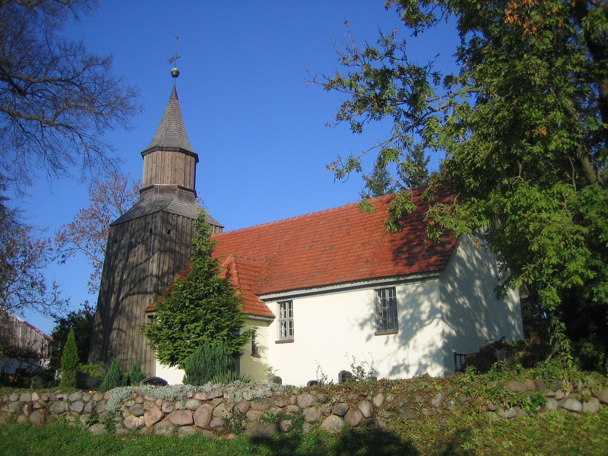 Dorfkirche Lebbin, Ortsteil der Gemeine Groß Teetzleben, Landkreis Mecklenburgische Seenplatte